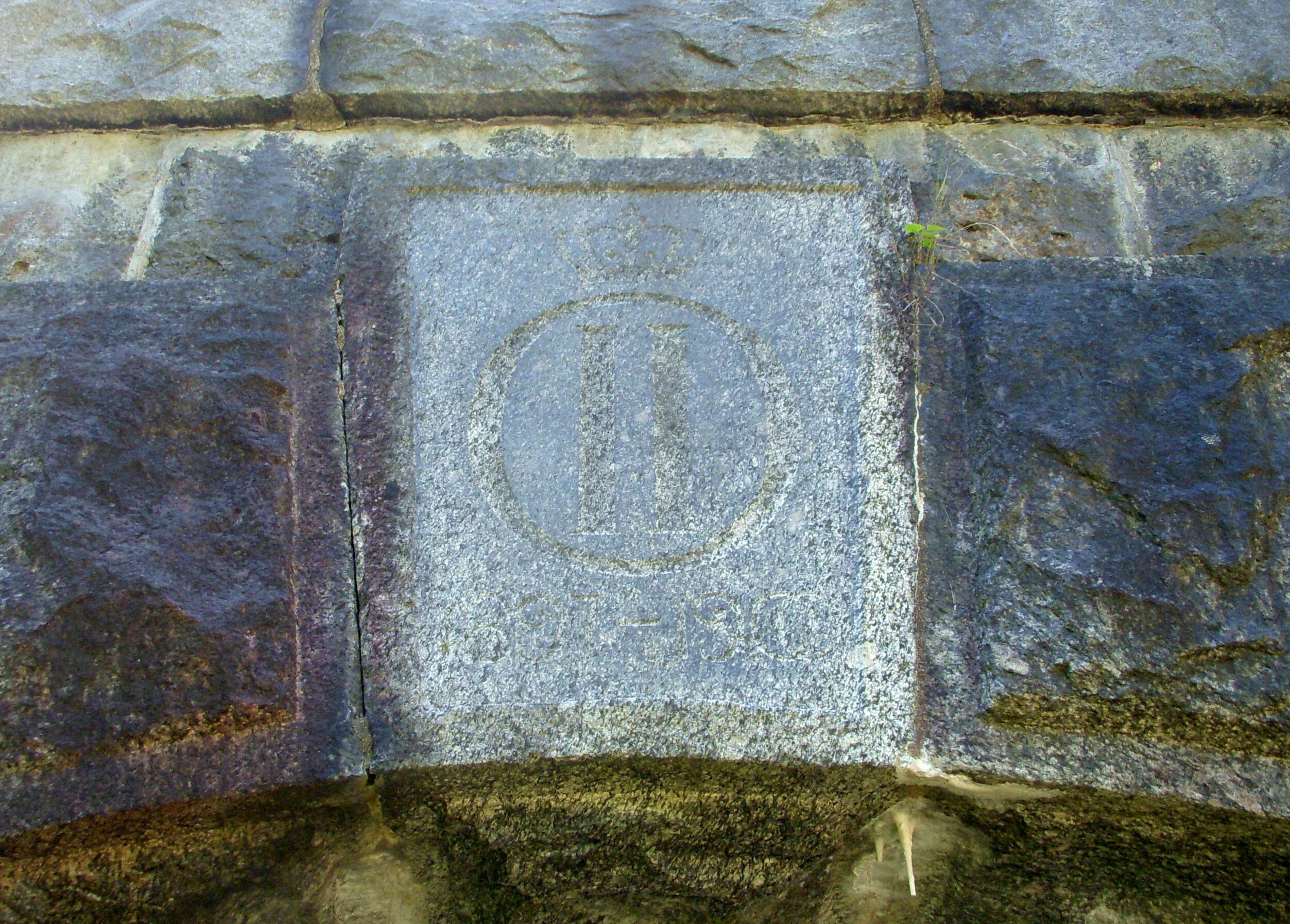 Byviksfortet, Oskar II:s namnskiffer samt årtal 1897-1900